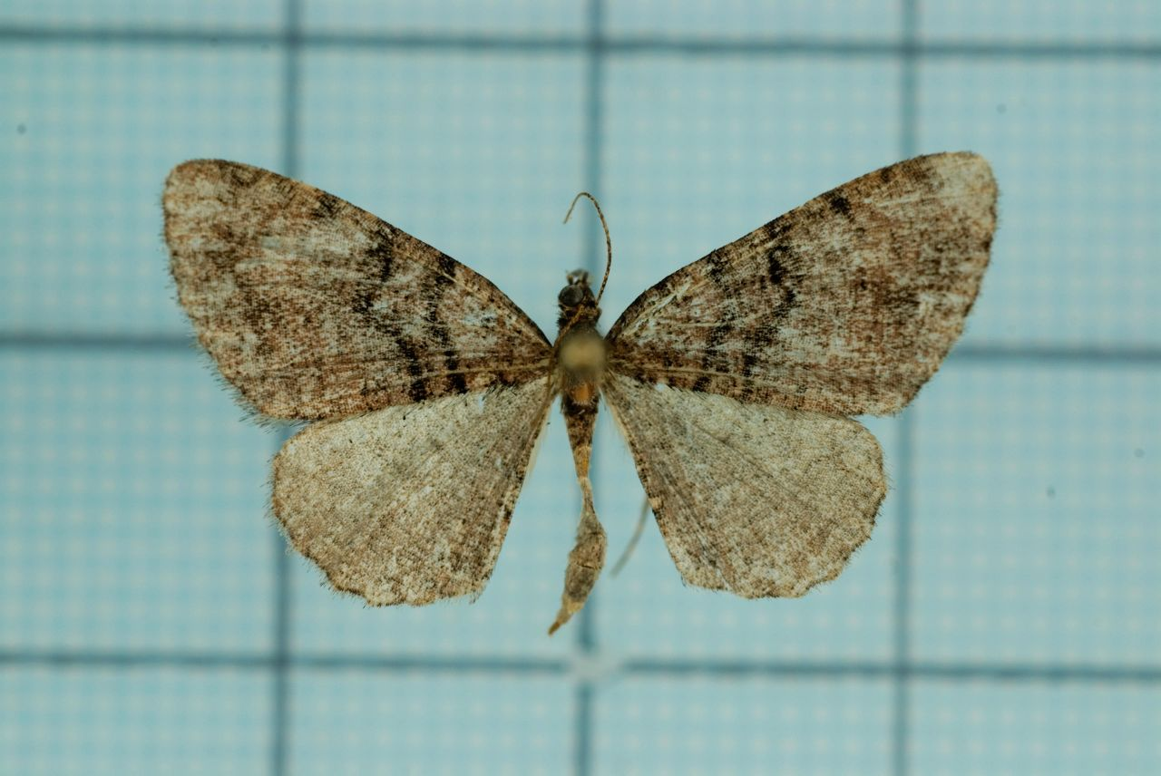 Anectropis fumigata Sato, 1991 姬三線猗尺蛾 臺灣尺蛾科圖鑑 2 P.233 female